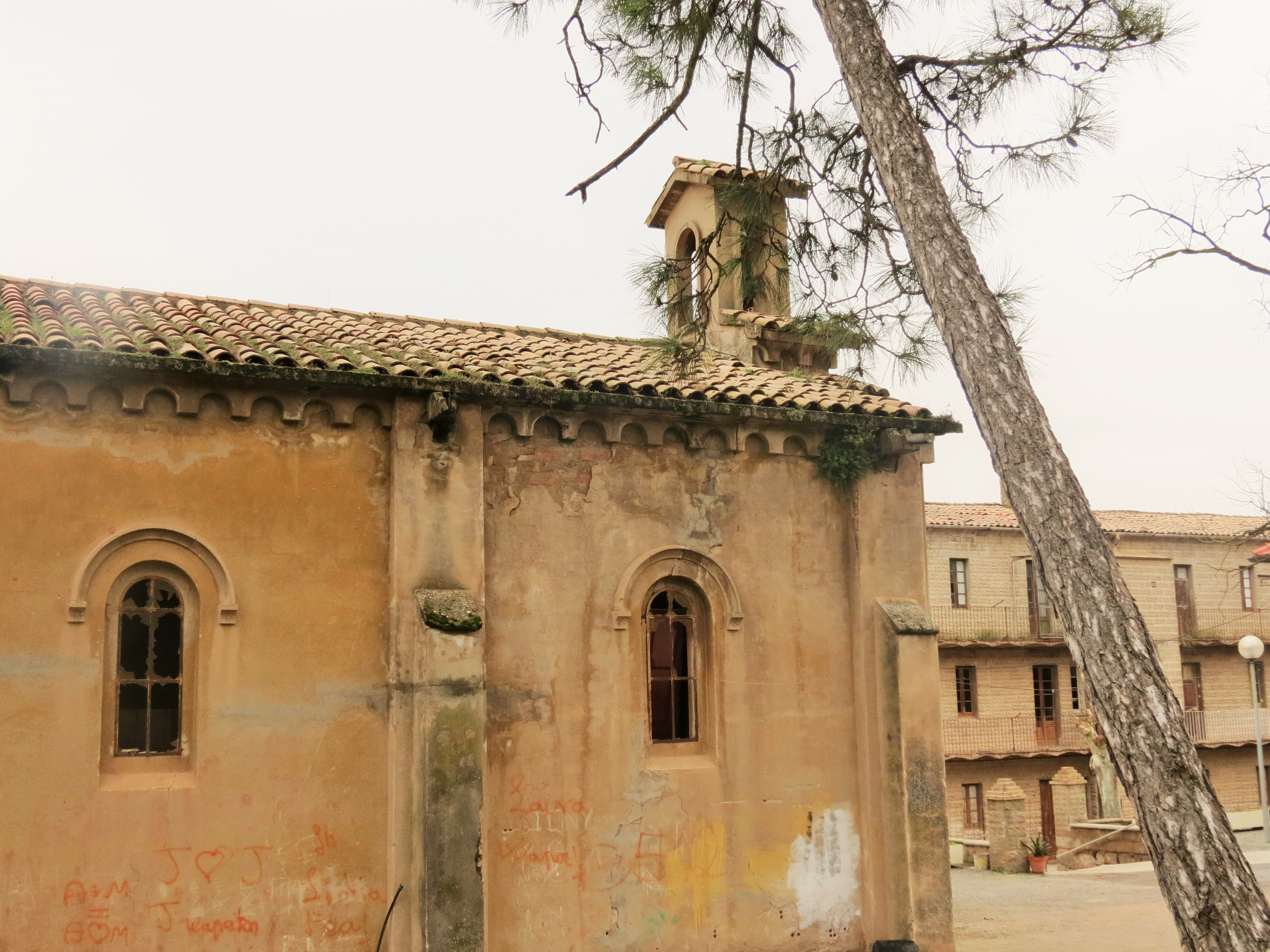 Visió lateral església